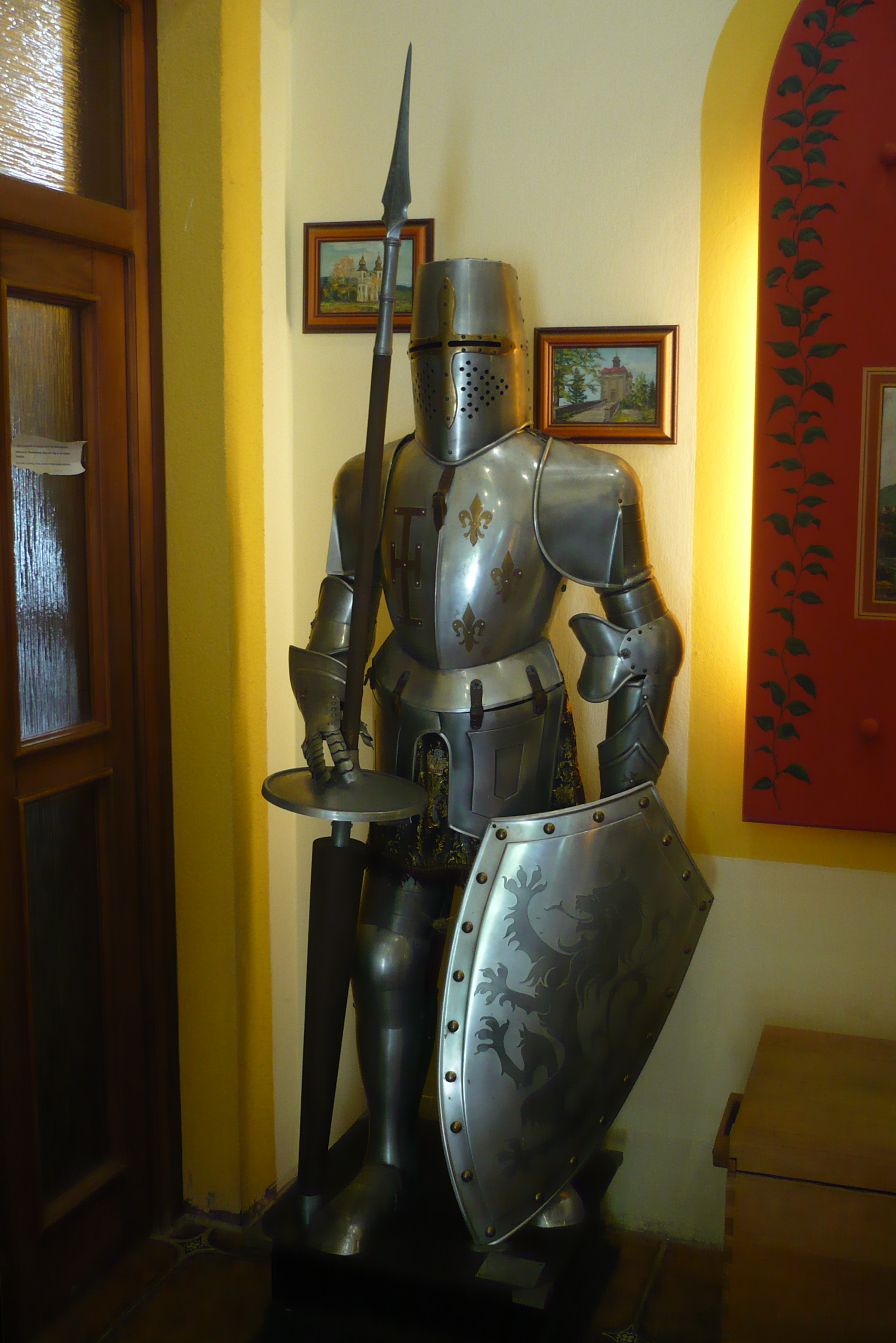 Janovicky. Zajazd Franza Birkego z 1916 r.5